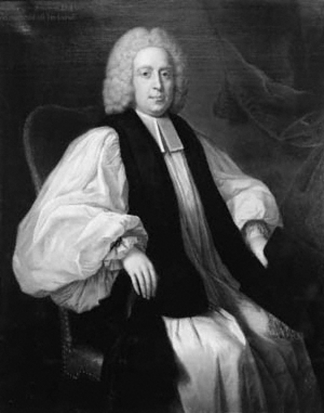 George Stone (1708–1764)